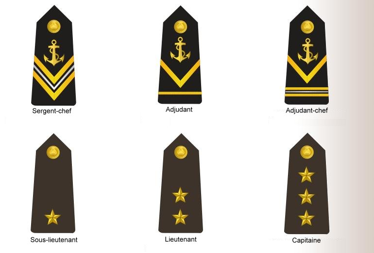 Grades des officiers de l'armée algérienne